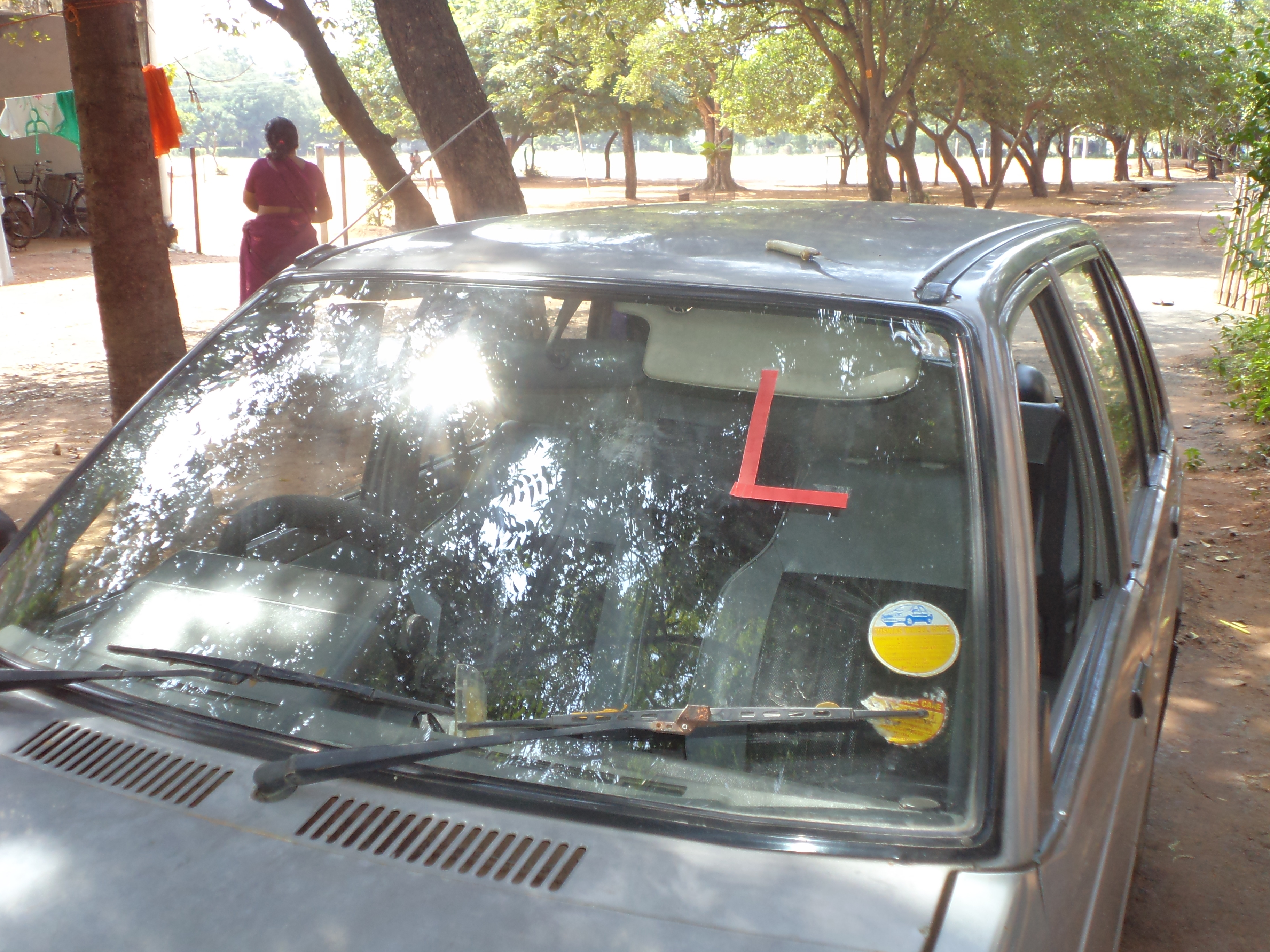 பழகுநர் உரிமம் பெறுவதற்காக வாகனத்தின் முகப்பில் எல் குறியீடு பொருத்தப்பட்டுள்ளது.